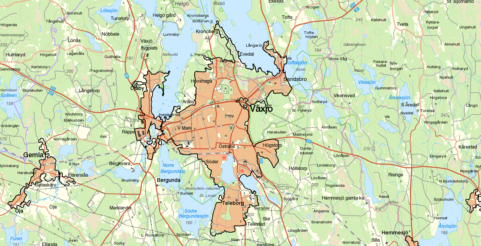 Tätorten Växjö med gränserna från Statistiska centralbyråns tätortsavgränsning 2015 i svart. Tätorten Gemla syns även på kartan. Bakgrundskarta från Lantmäteriet, skala 1:60 472.